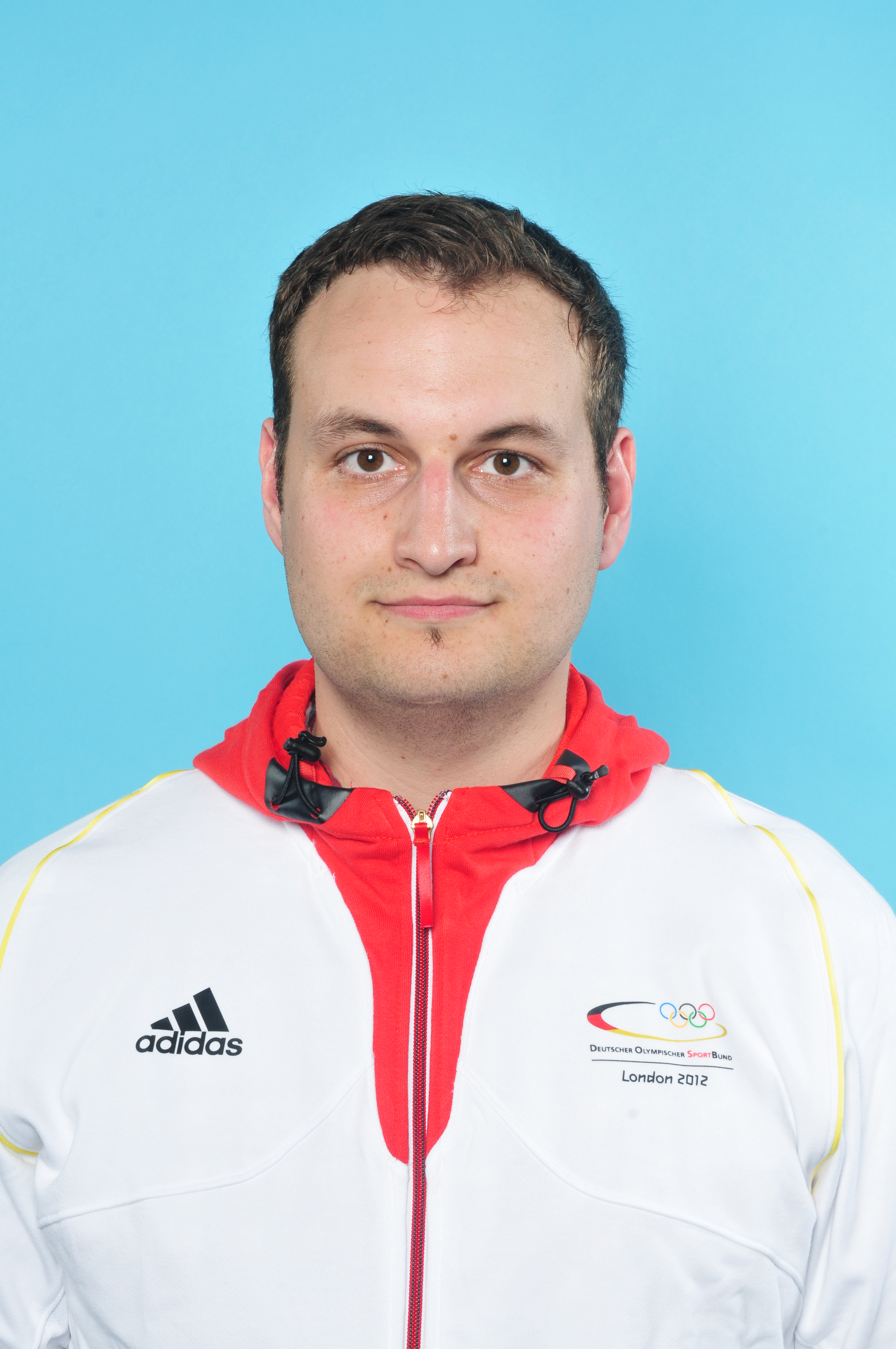 Einkleidung der deutschen Olympiamannschaftam 28. Juni 2012 in Mainz - Olympische Sommerspiele 2012 Cirdan Marcus Cyron Olaf Kosinsky Ralf Roletschek Sven Teschke